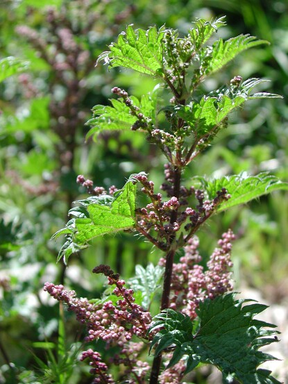 Urtica atrovirens Sardinia 25 may 2002